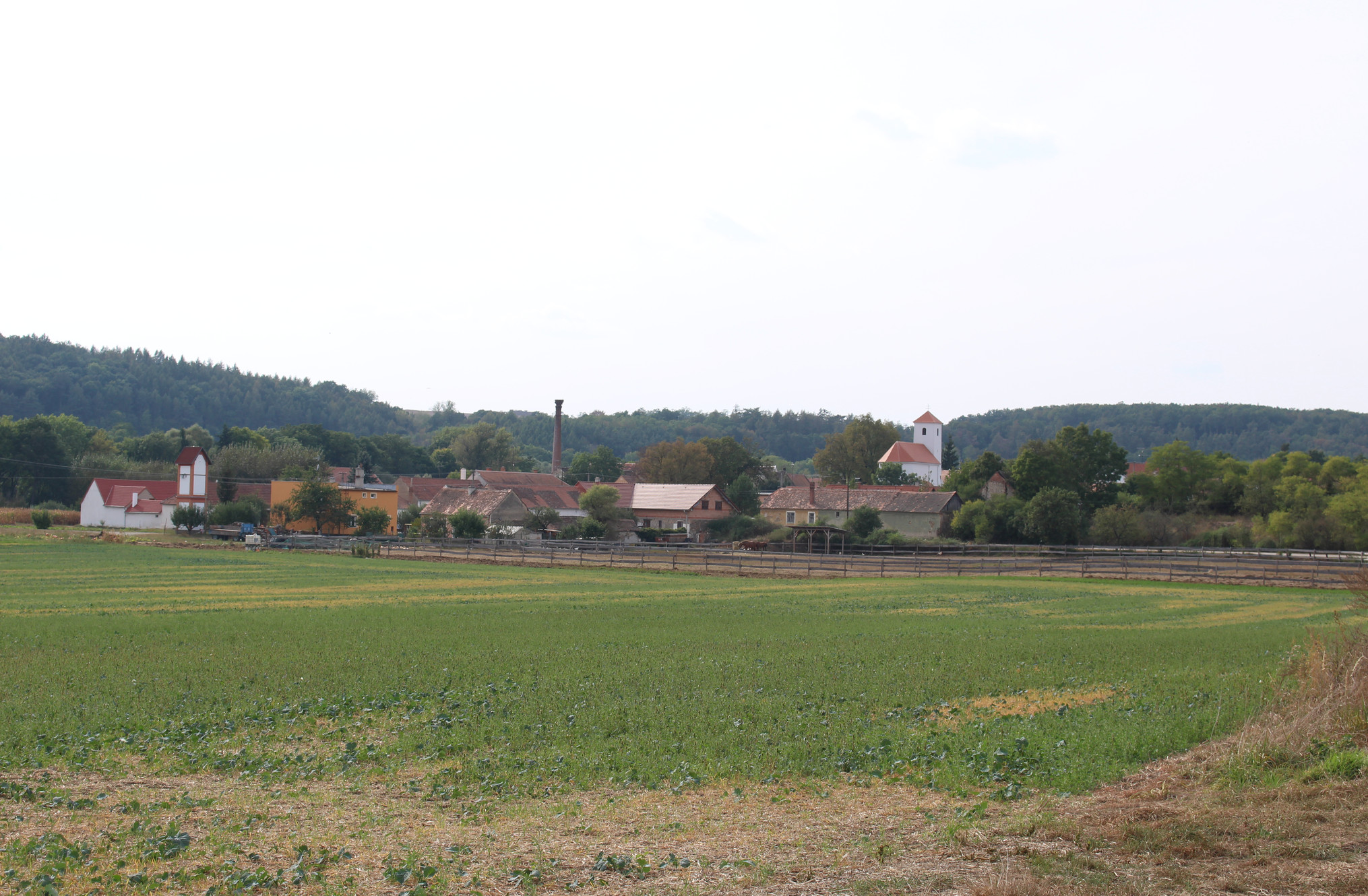 Černín, okres Znojmo, Jihomoravský kraj, pohled na střed obce s kostelem sv. Jakuba Většího od ZD